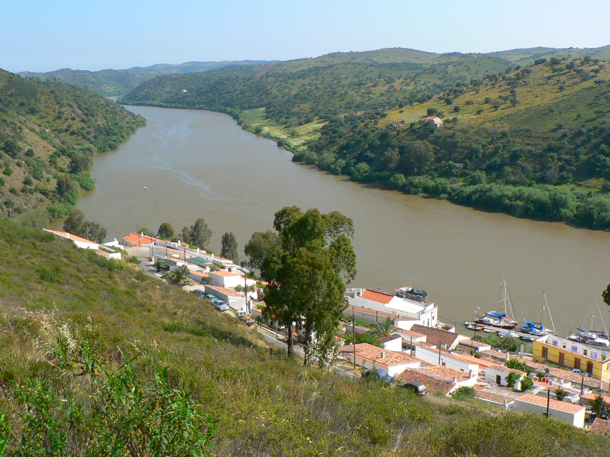 Vista do Rio Guadiana no Pomarão